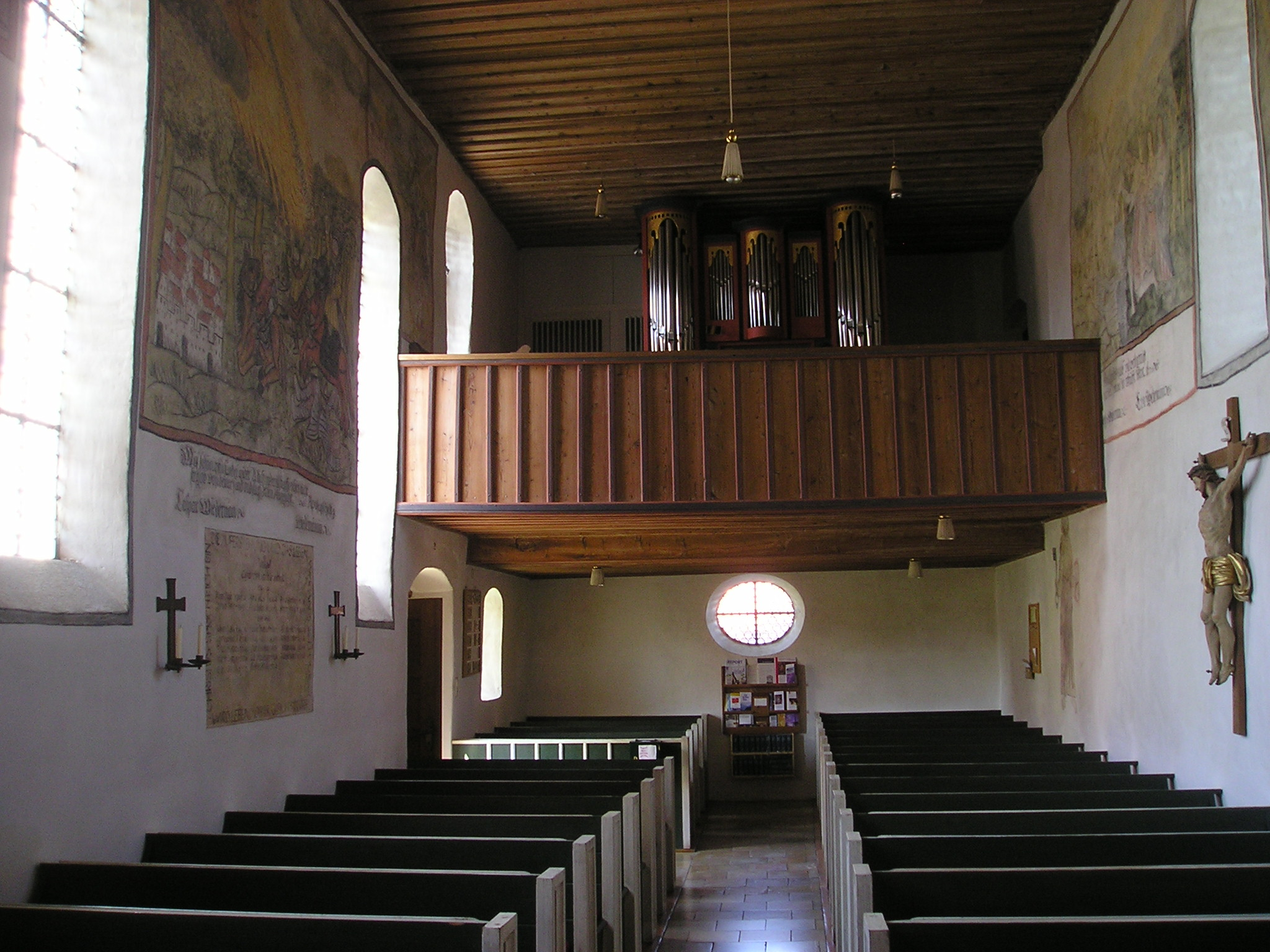 Bühl i. Ries, Gemeindeteil von Alerheim im Landkreis Donau-Ries (Bayern), Evang. St.-Marien-Kirche, Blick in den Westen der Kirche